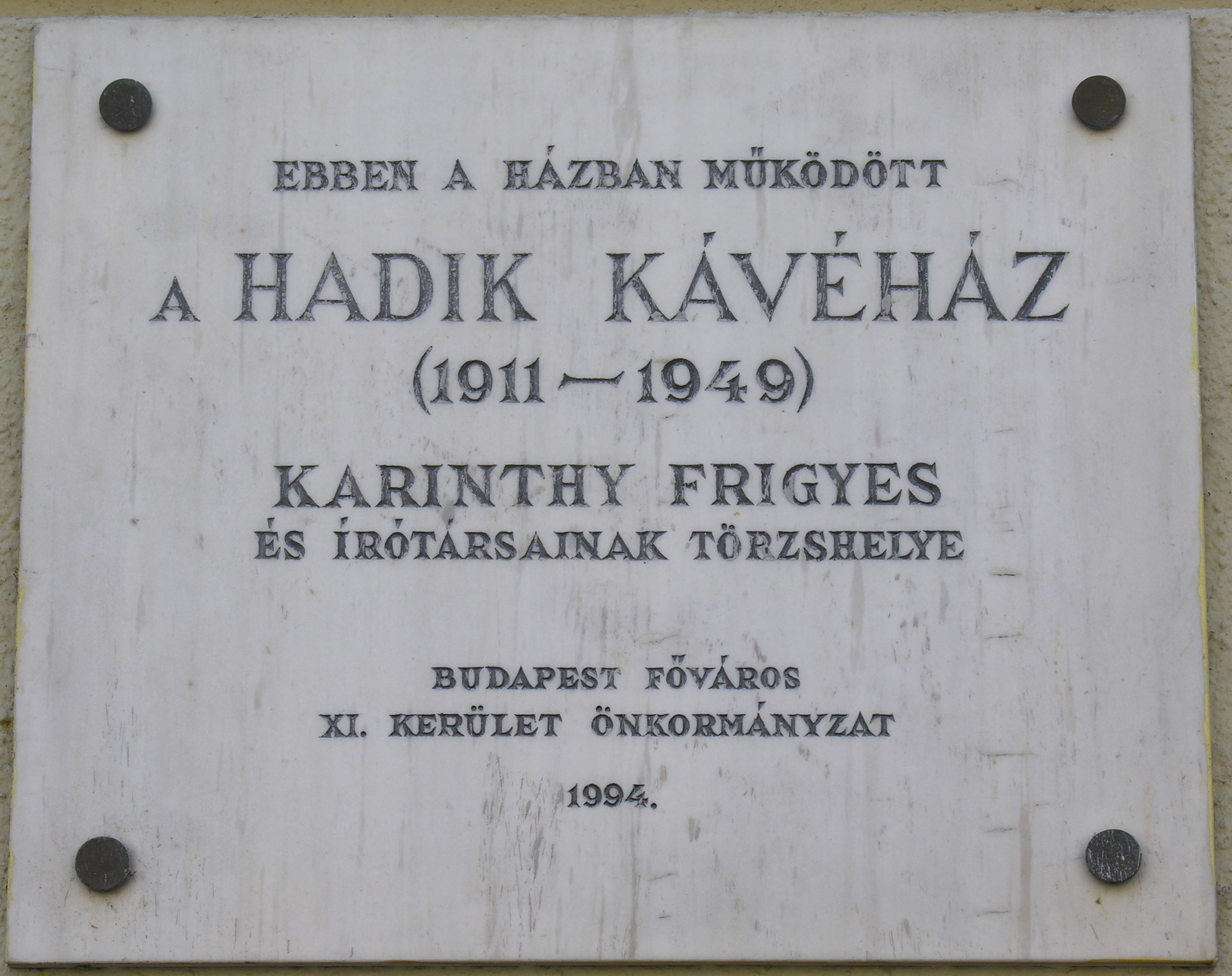 Hadik kávéház emléktáblája, Budapest, XI., Bartók Béla út 36-38. (38.)